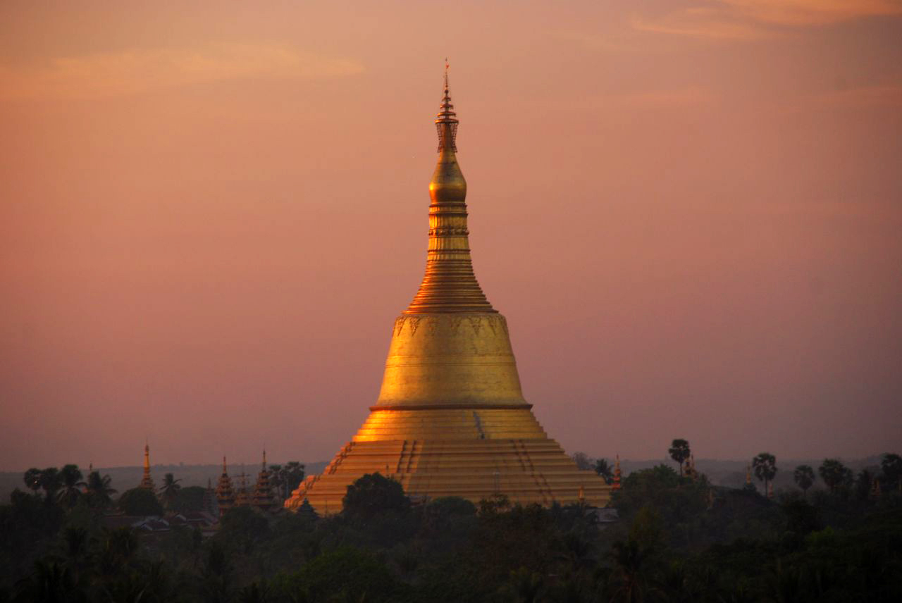 Shwemawdaw Pagoda, a Mon-style Pagoda in Bago, Myanmar